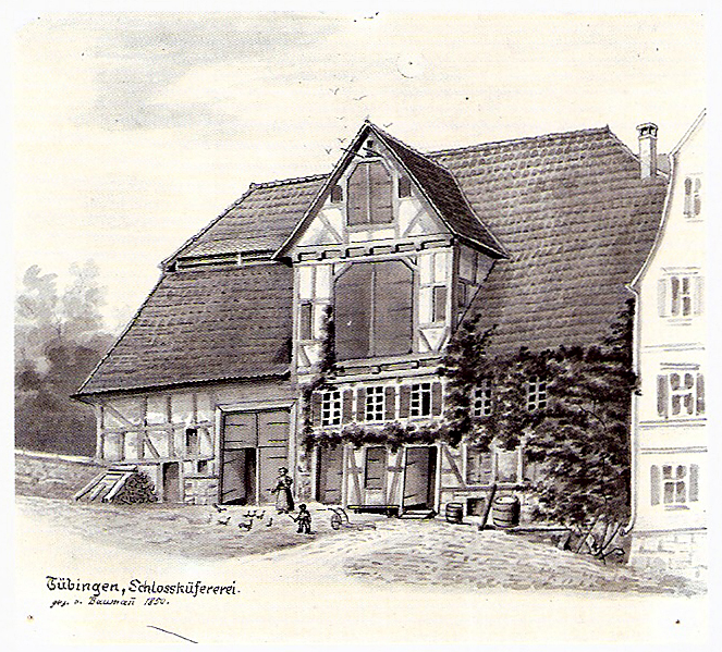 Schlossküferei in Tübingen (Tusche-Pinselzeichnung über Bleistift 21,6 × 24,2 cm)